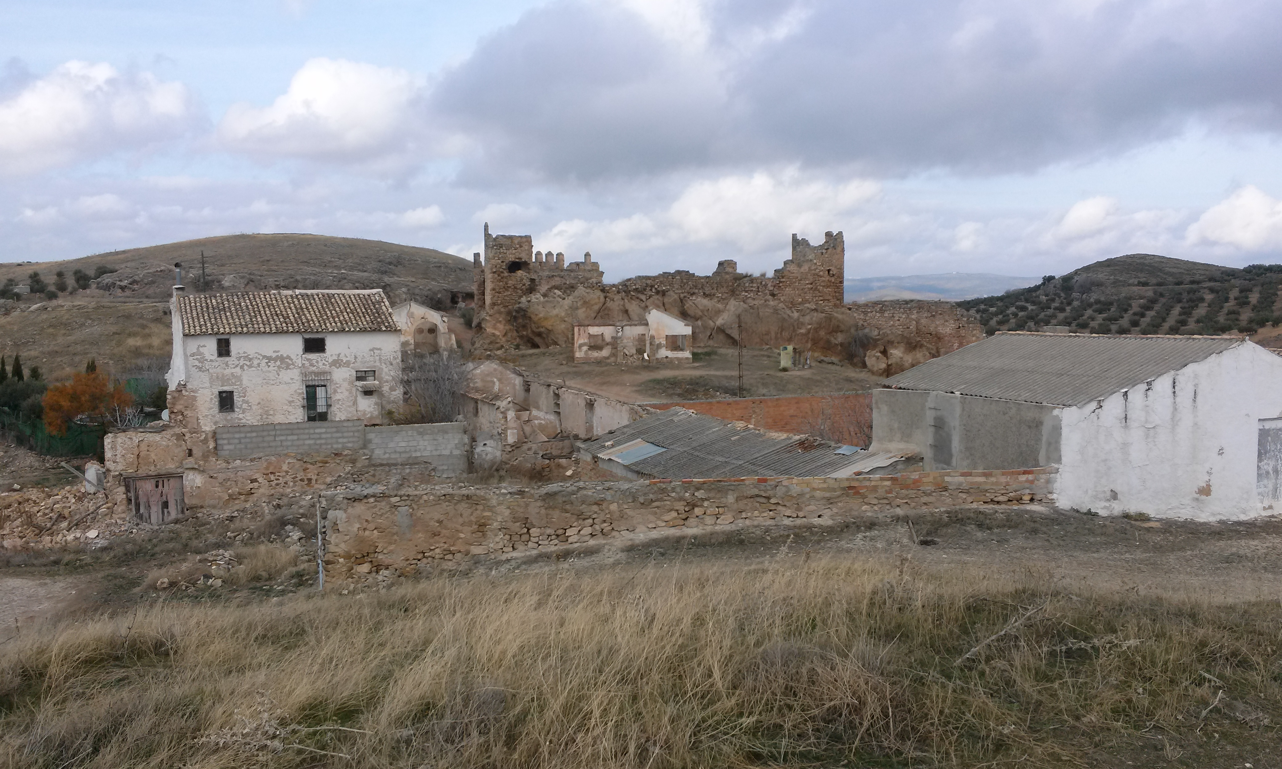 Vista de El Berrueco.